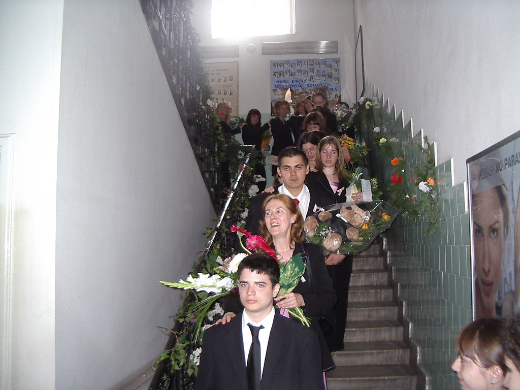 Ballagás a Hajnik Károly Közgazdasági Szakközépiskolában (Budapest, VII.)